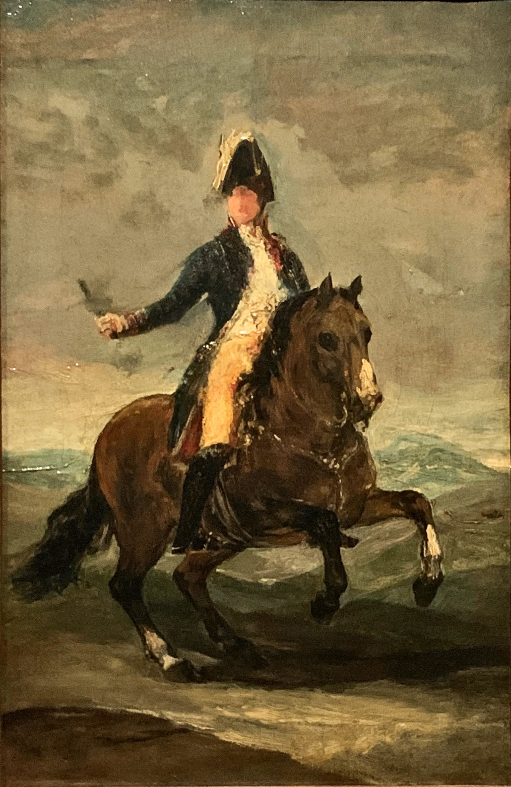 Retrato ecuestre del rey Fernando VII de España (1784-1833), que fue hijo del rey Carlos IV de España.